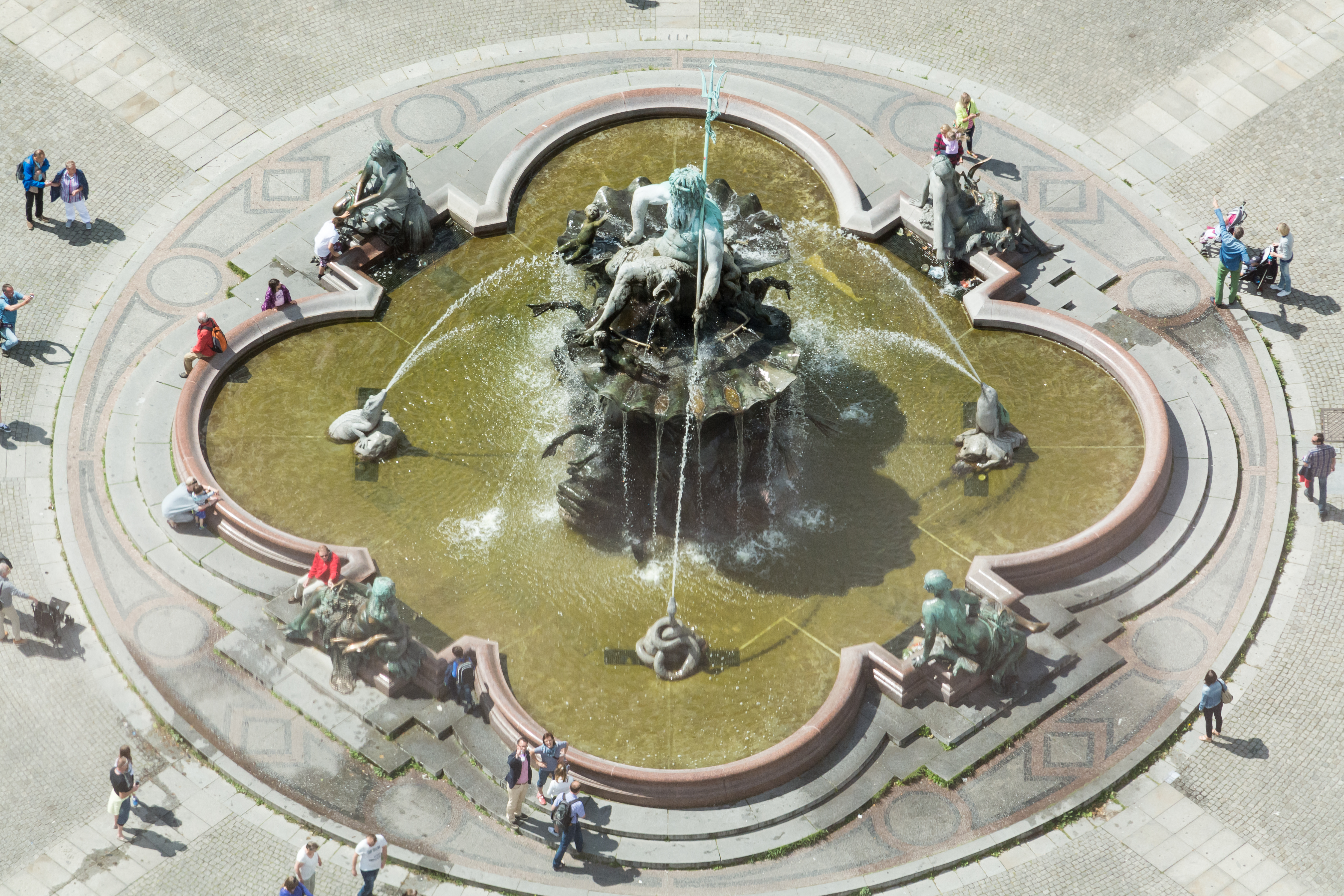 Blick vom Berliner Fernsehturm auf den Neptunbrunnen in Berlin-Mitte. This is a photograph of an architectural monument.